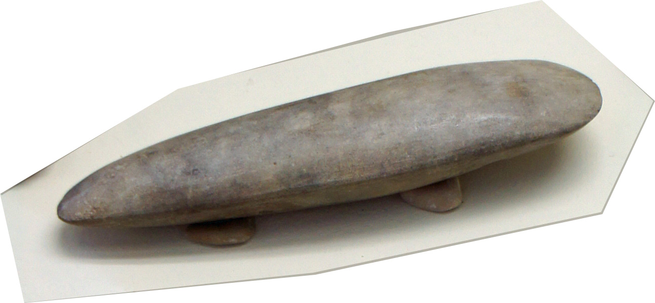 Objets du musée st-Remi de Reims.